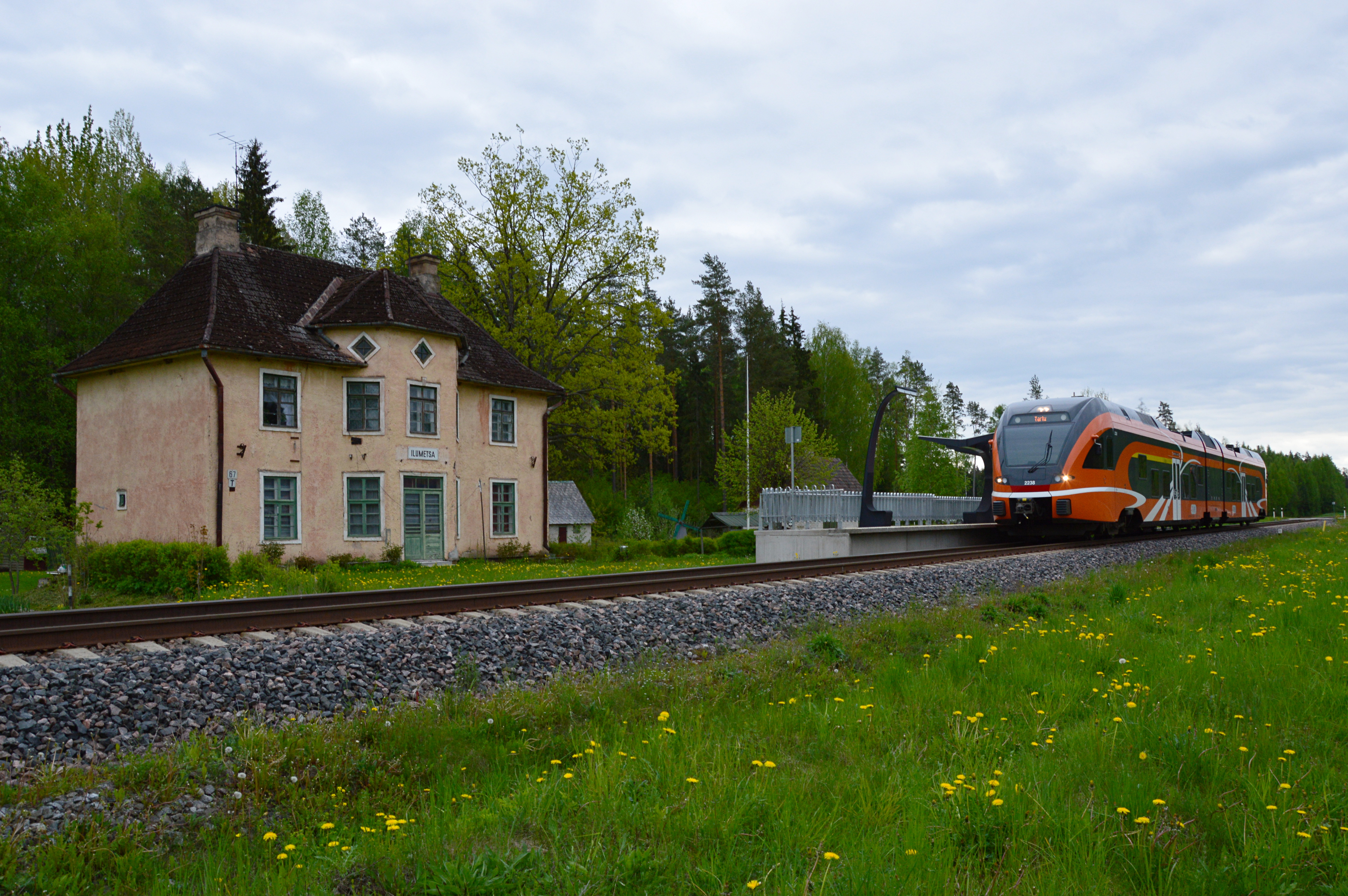 Ilumetsa raudteepeatus.